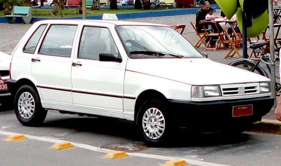 Fiat Mille Taxi in Itanhaém, São Paulo